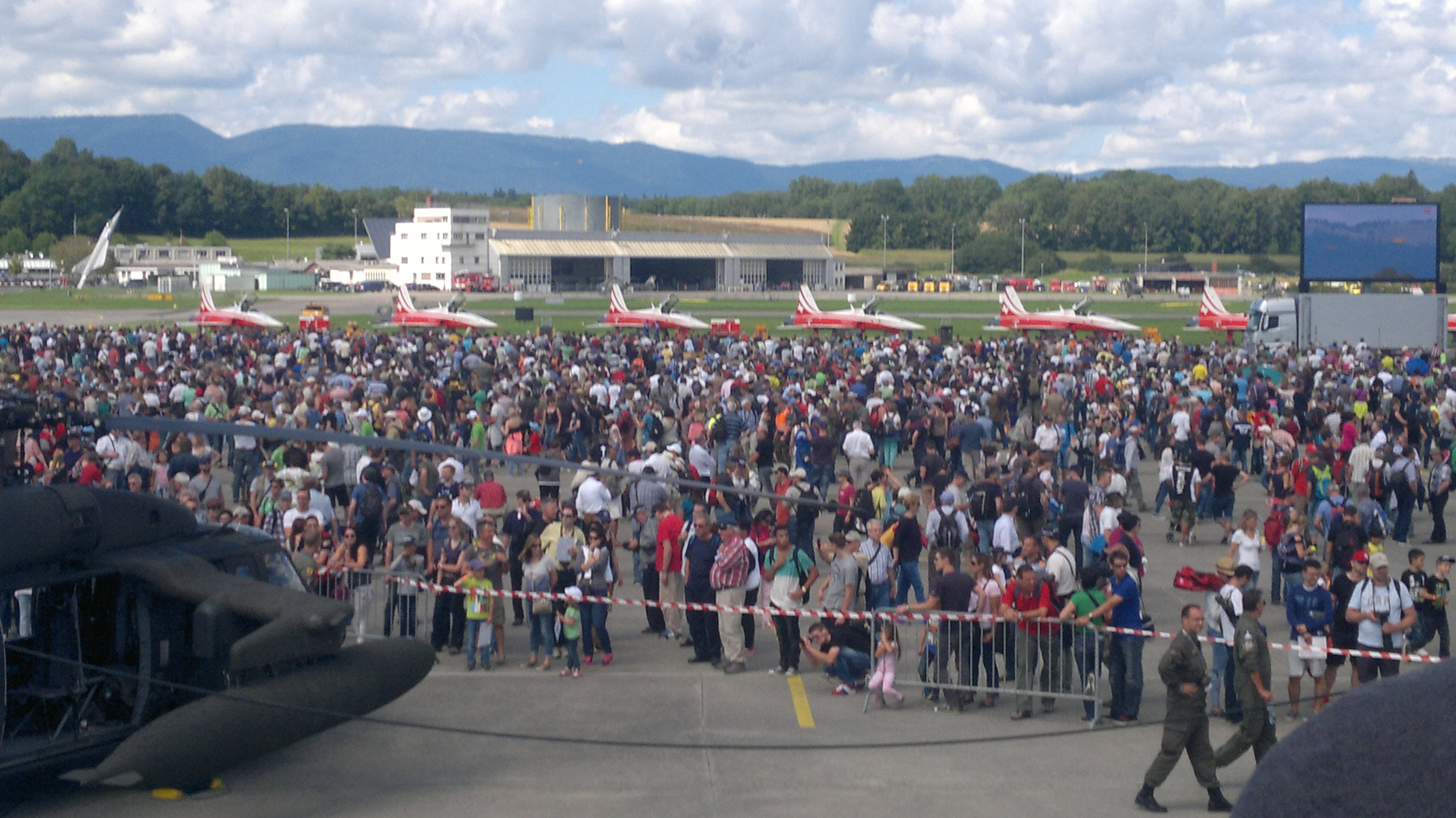 air 14 Payerne